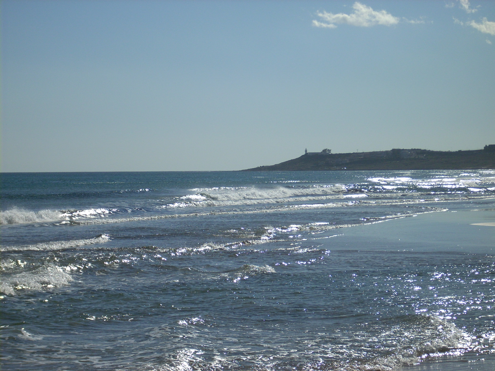 Cabo de las Huertas. Playa de San Juan, Alicante (España).